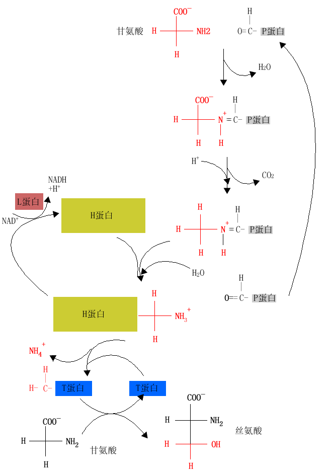 Die Transferation vom Glycin zum Serin im Mitochrodium